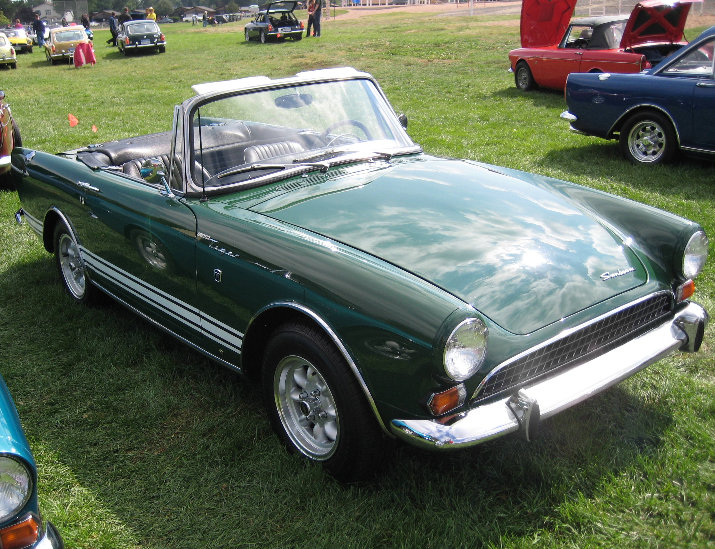 Five Sunbeam Tigers